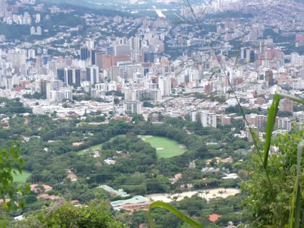 Caracas desde Parque Nacional El Avila, Distrito Capital - Venezuela